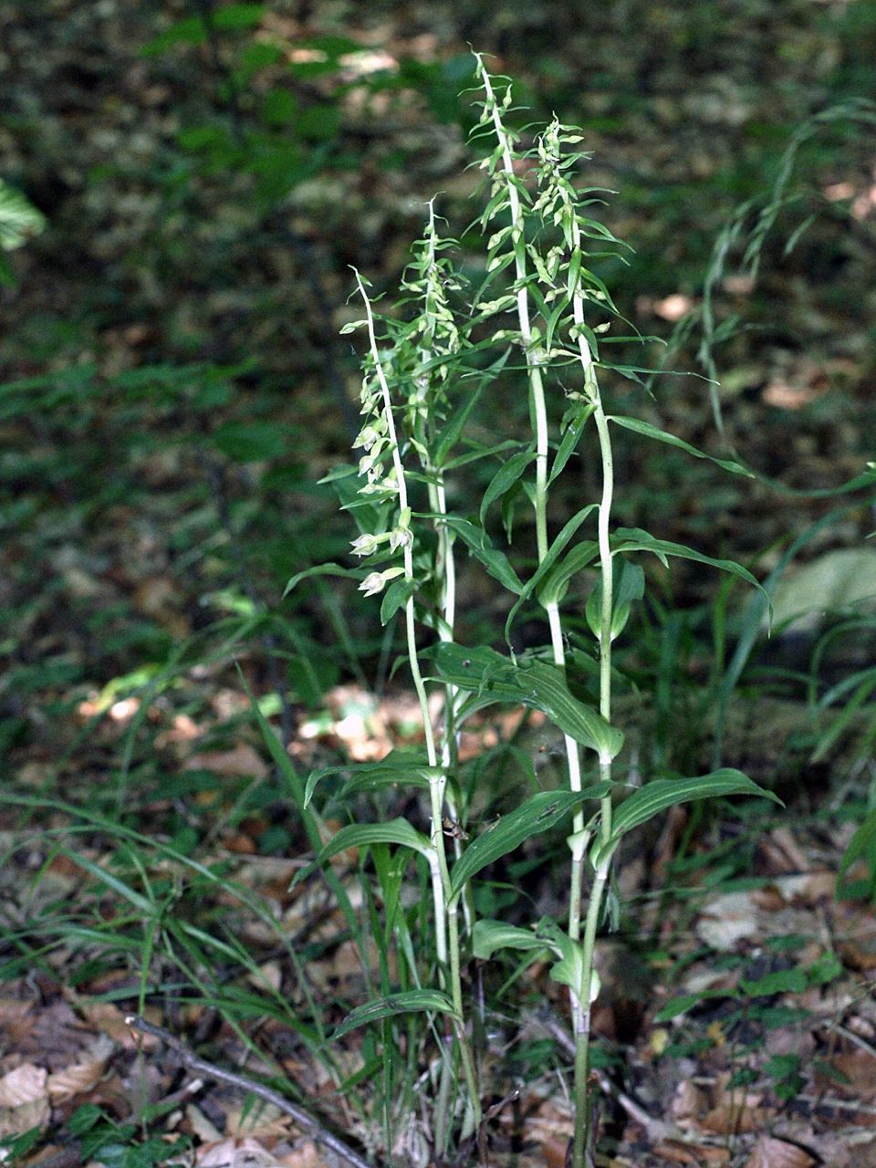 Epipactis leptochila - plants